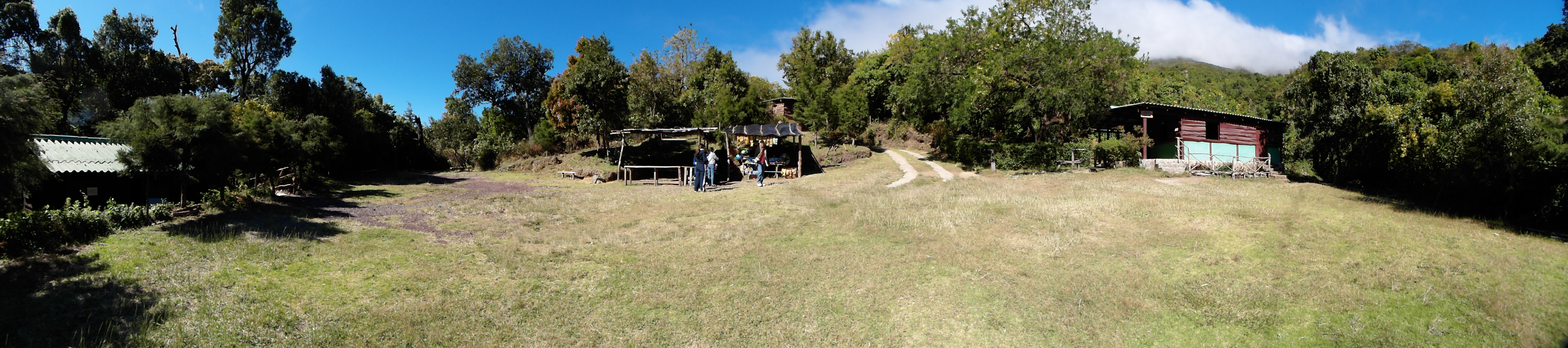 vista impresionante parque Los Volcanes